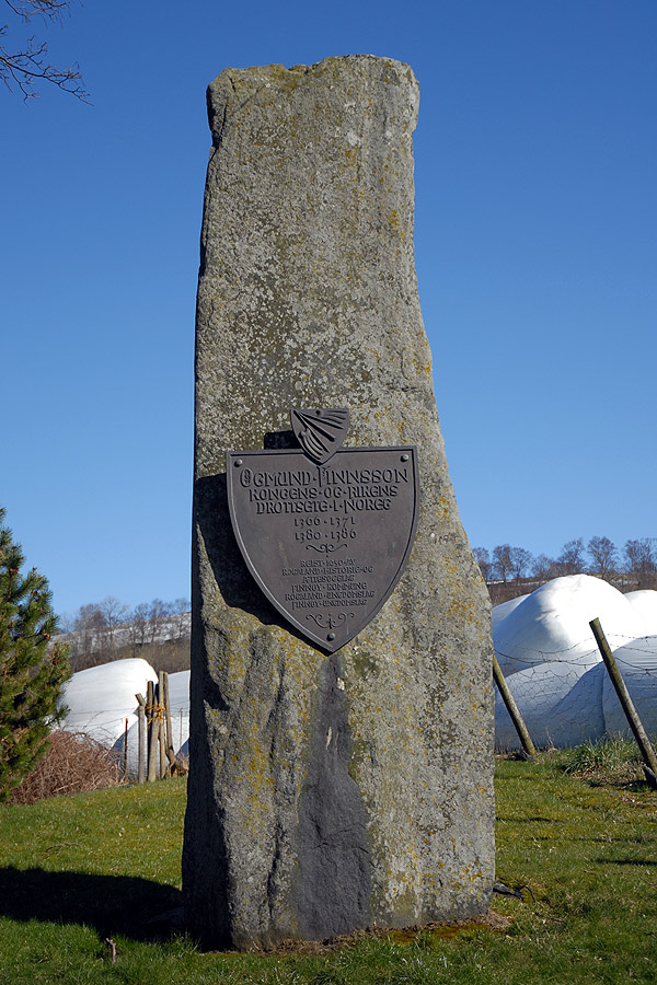 Ogmund Finnsson - minnesmerke utenfor Hesby kirke på Finnøy, Rogaland